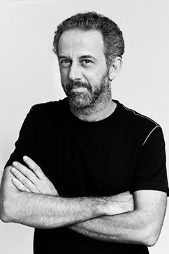 Baterista do Os Paralamas do Sucesso desde 1982.